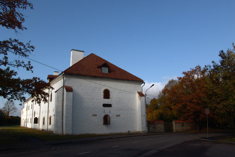 Здание художественной галереи